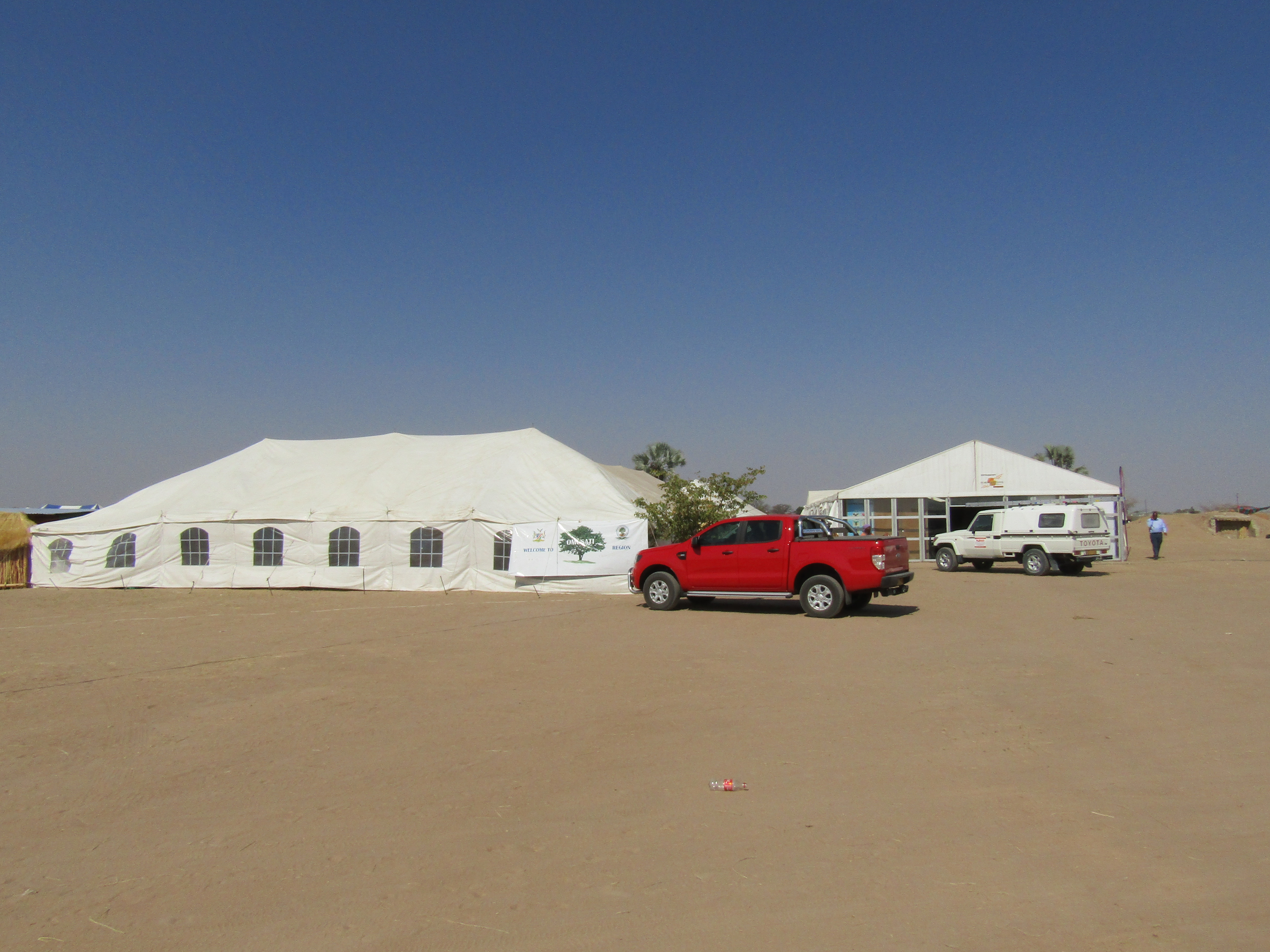 Olufuko Messegelände